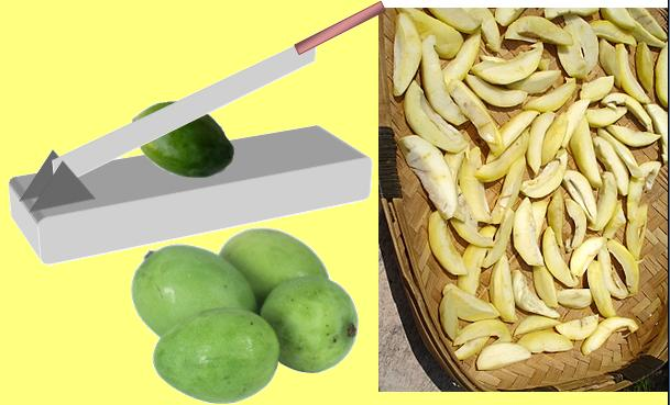 self prepared. आमकटना